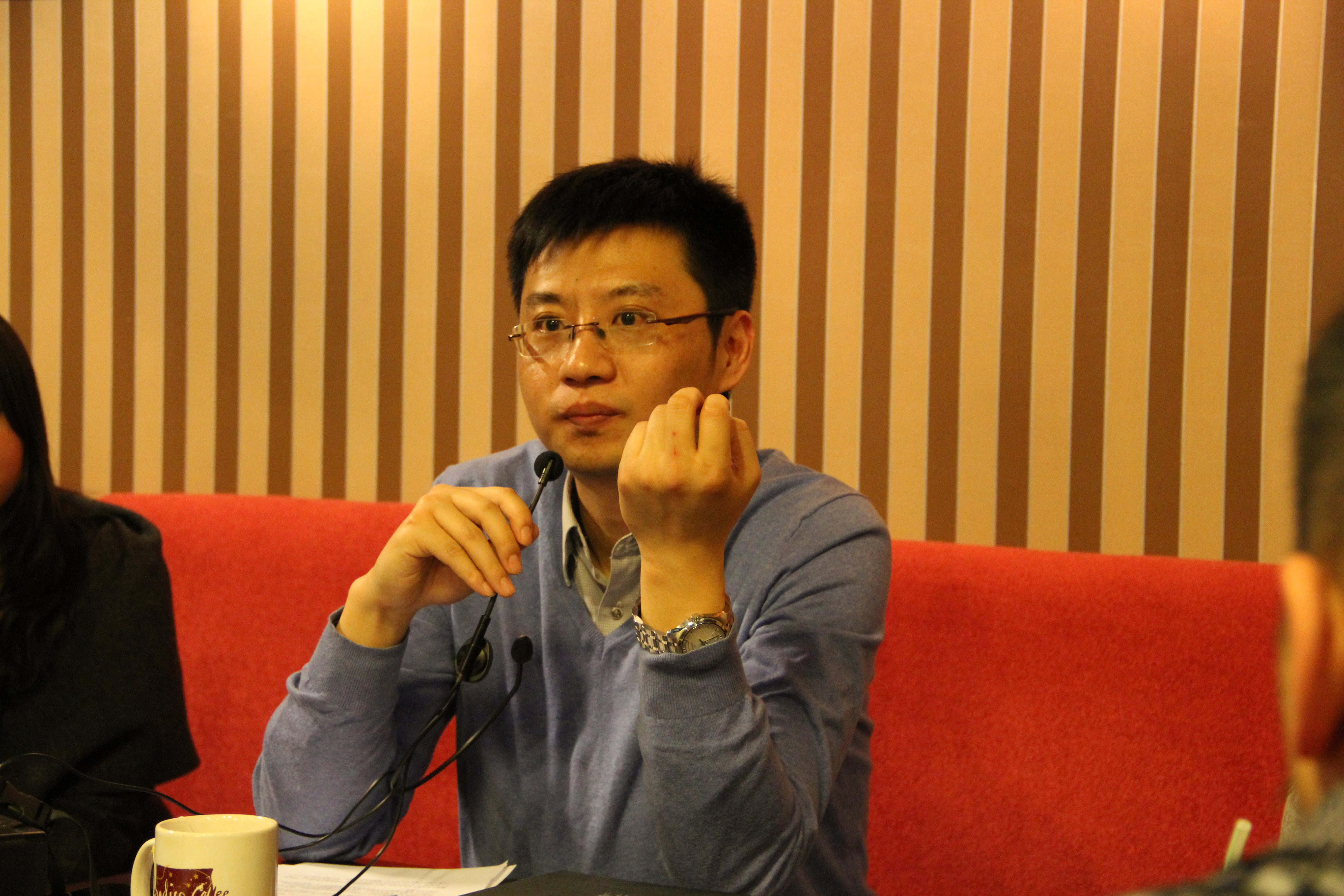 周濂老师在勺见沙龙上。